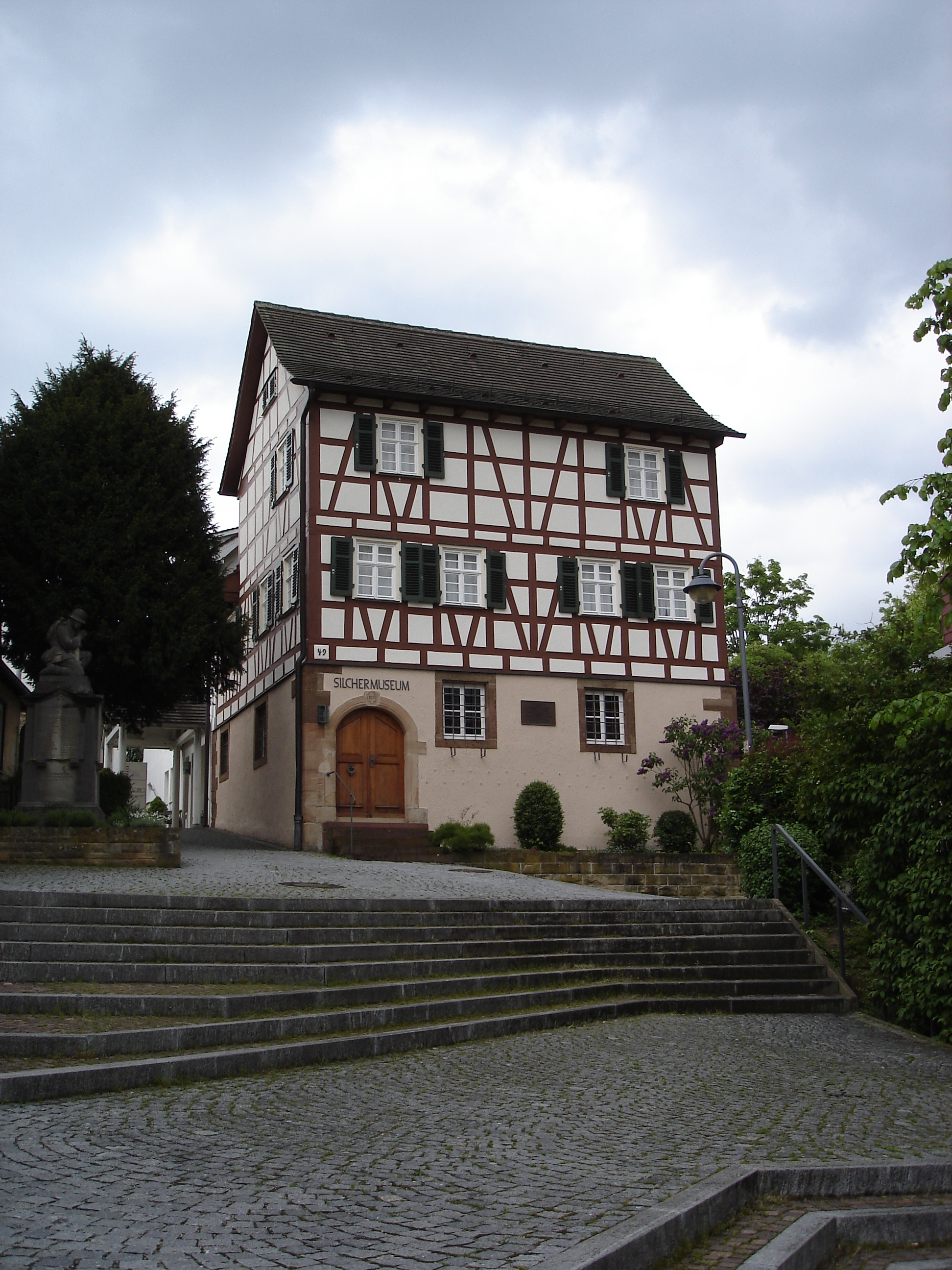 Silchermuseum in Schnait. Links neben dem Museum ist das Kriegerdenkmal zu Ehren der Gefallenen des 1. Weltkrieges zu sehen.